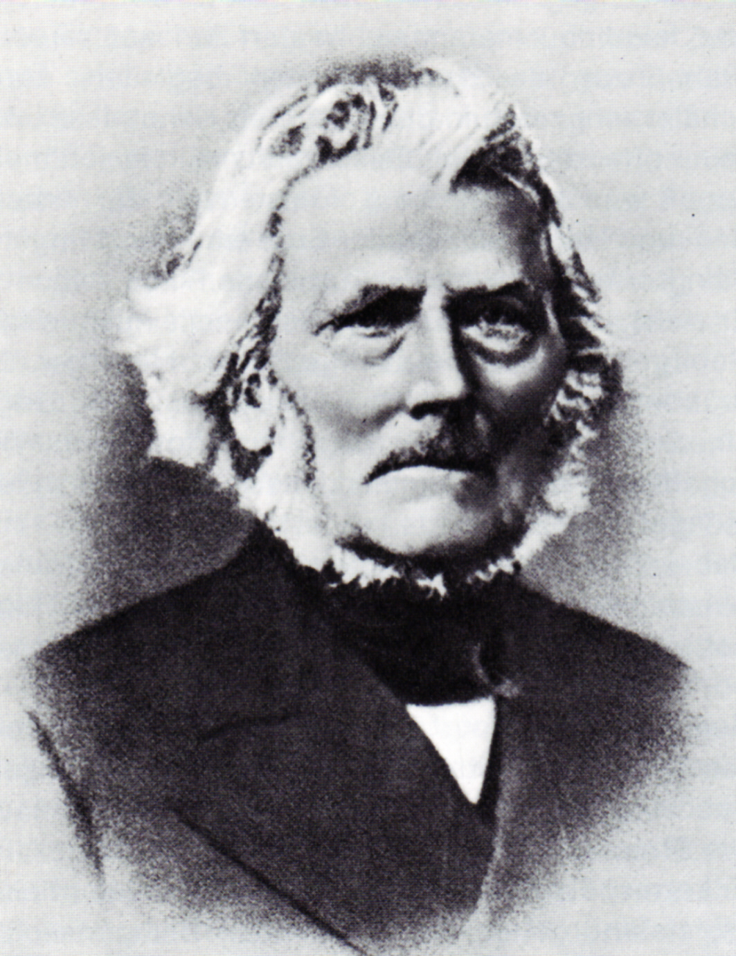 Friedrich Harkort (* 22. Februar 1793; † 6. März 1880), deutscher Unternehmer